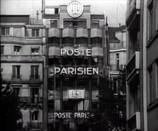 Façade de l'immeuble du Poste Parisien au 116 bis avenue des Champs-Elysées à Paris